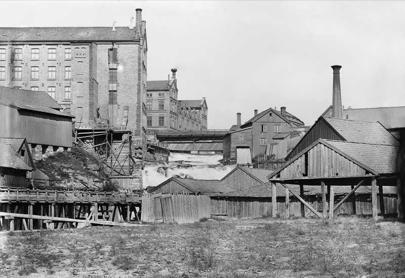 Fabrikkbygninger, Graahs spinneri, Hjula veveri, Tugthusets klesstampe, Foss spinneri, barkestampe, elv, foss